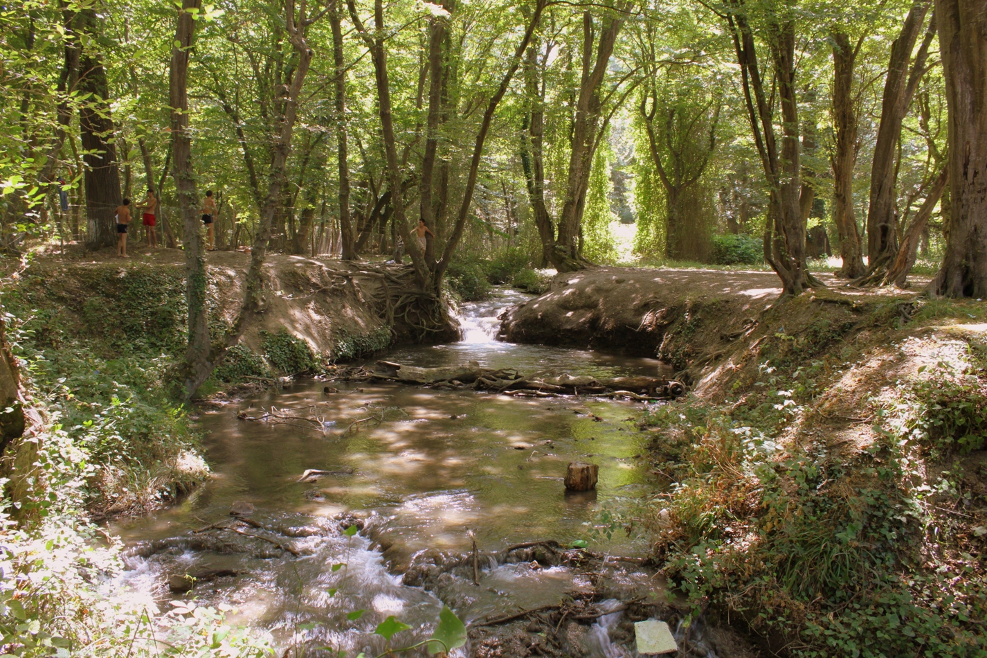 Хачмазский район Азербайджана, зога отдыха Набрань.